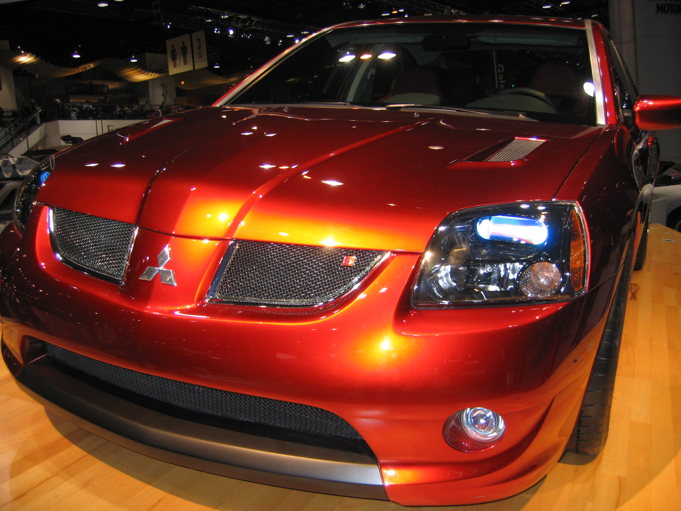 Mitsubishin osastoa Chicagon autonäyttelyssä 2005.